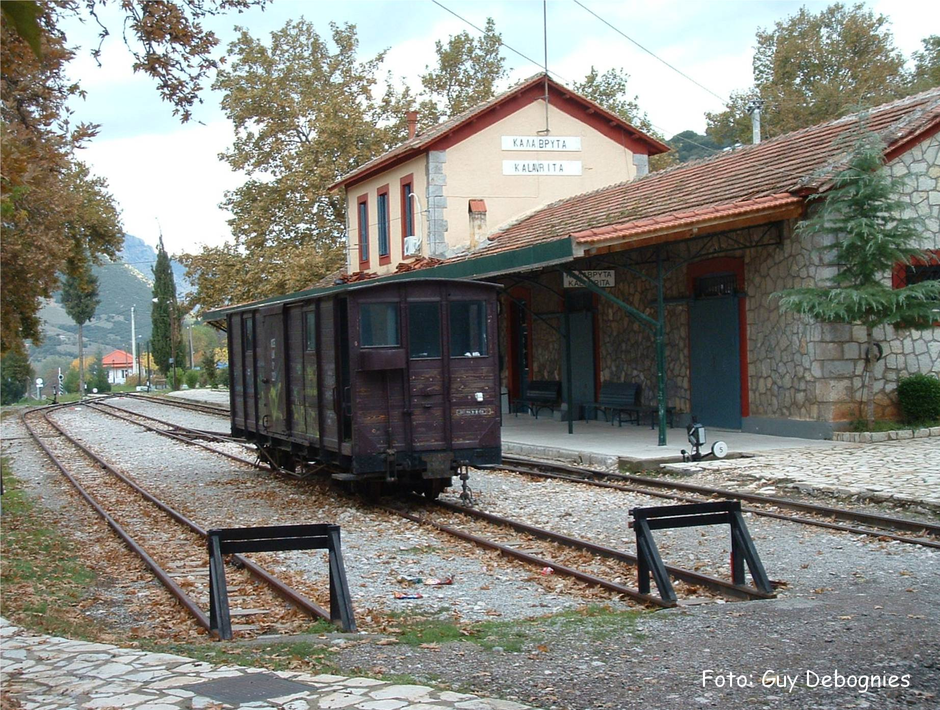 Kalavryta train station